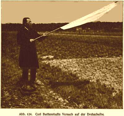 Carl Buttenstedt († 20. September 1910) bei einem Drehscheibenversuch mit einer künstlichen Feder. Anhand der ausgelösten waagerechten Drehbewegung nach einem senkrecht ausgeführten Federschlag wollte Buttenstedt eine seiner Flugtheorien beweisen. Quellen: Carl Buttenstedt: Das Flugprincip. Eine populär-wissenschaftliche Naturstudie als Grundlage zur Lösung d. Flugproblems, Berlin 1892 Franz Maria Feldhaus: Ruhmesblätter der Technik von den Urerfindungen bis zur Gegenwart. F. Brandstetter 1910